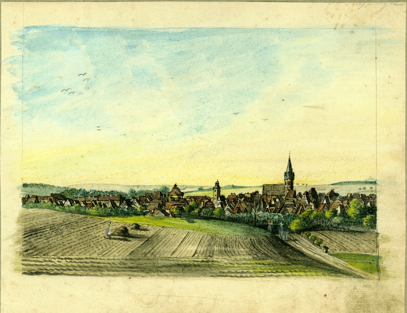 ansicht von Eppingen, Aquarell um 1850